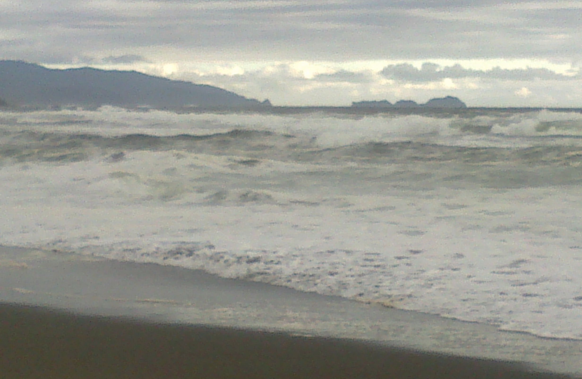 Isla Metalqui desde la playa de Aulen, en la desembocadura del río Chepu, costa noroccidental de la Isla Grande de Chiloé, Chile.